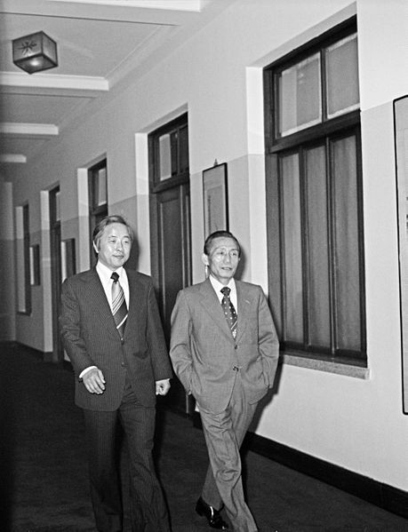 박정희 대통령 김영삼 신민당 총재 접견 촬영일 : 1975년 05월 21일 촬영장소 : 대한민국 참석자 : 박정희 대통령, 김영삼 인물상세정보 : 박정희 대통령(우) , 김영삼(좌) 관련내용 : 박정희 대통령 김영삼 신민당 총재 접견